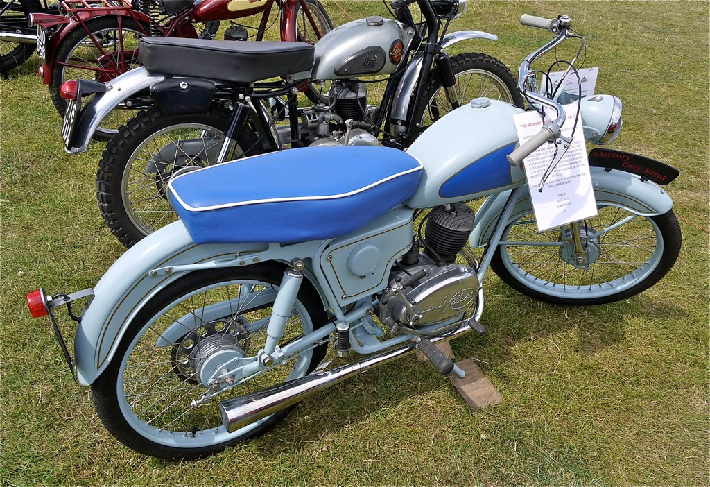 Panasonic G1 14-45 Lens